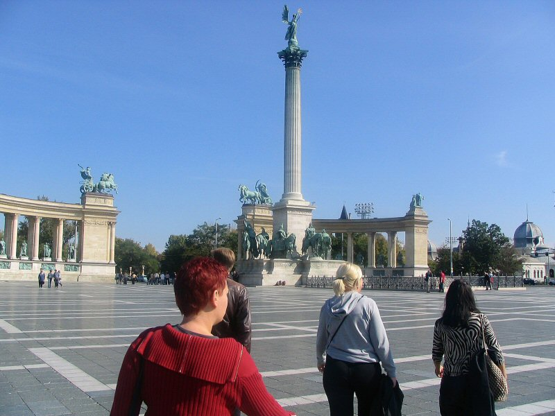 Heroes' Square (Budapest) Photo Otto-Ville Mikkelä